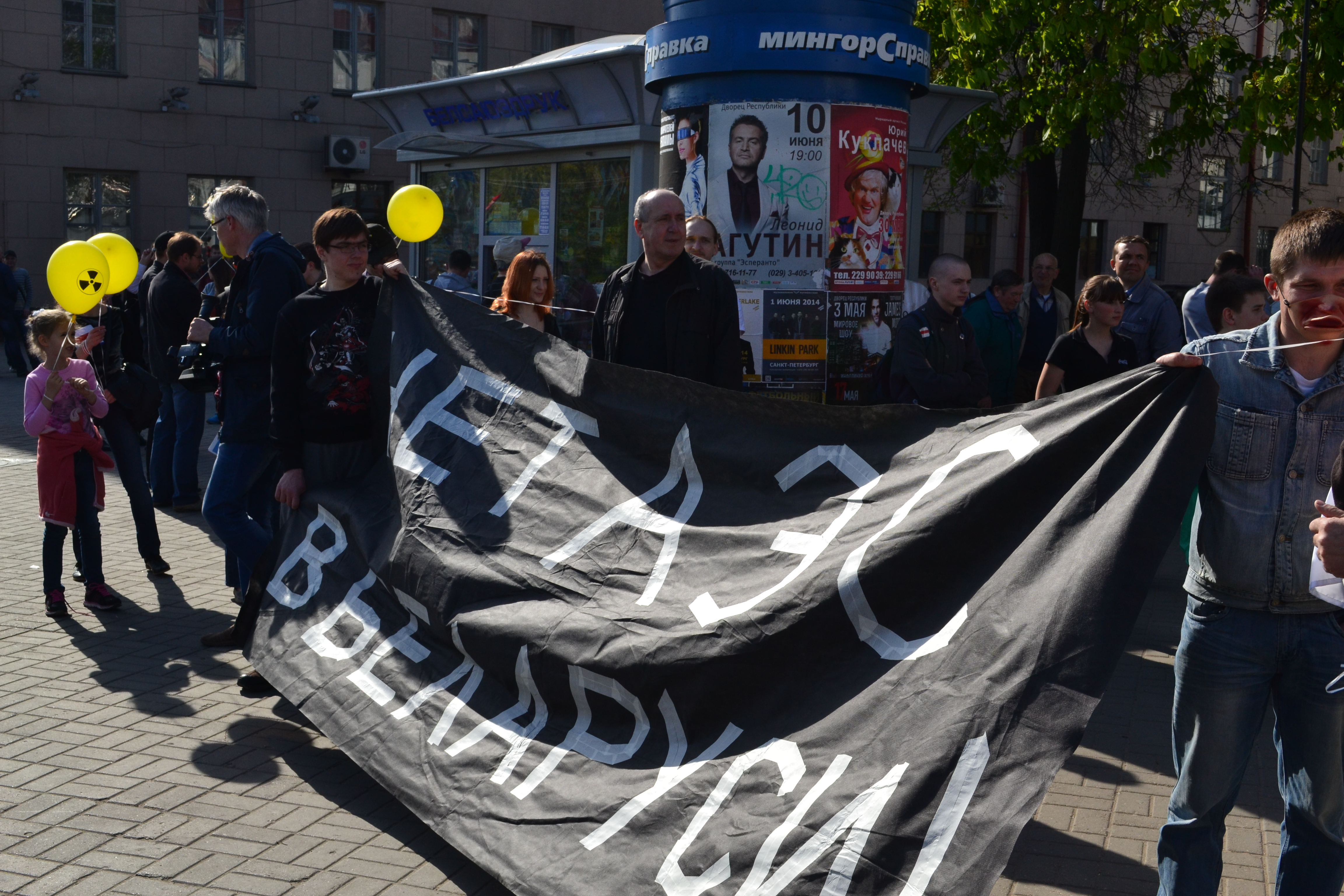 Беларуская (тарашкевіца): Чарнобыльскі шлях